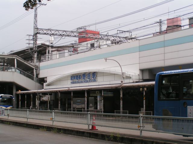 阪神野田駅